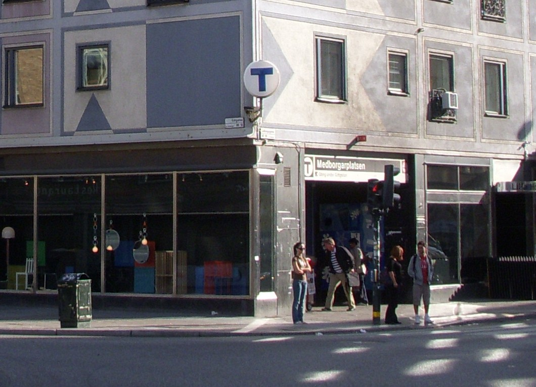 Tunnelbanestationen "Medborgarplatsen" i Stockholm